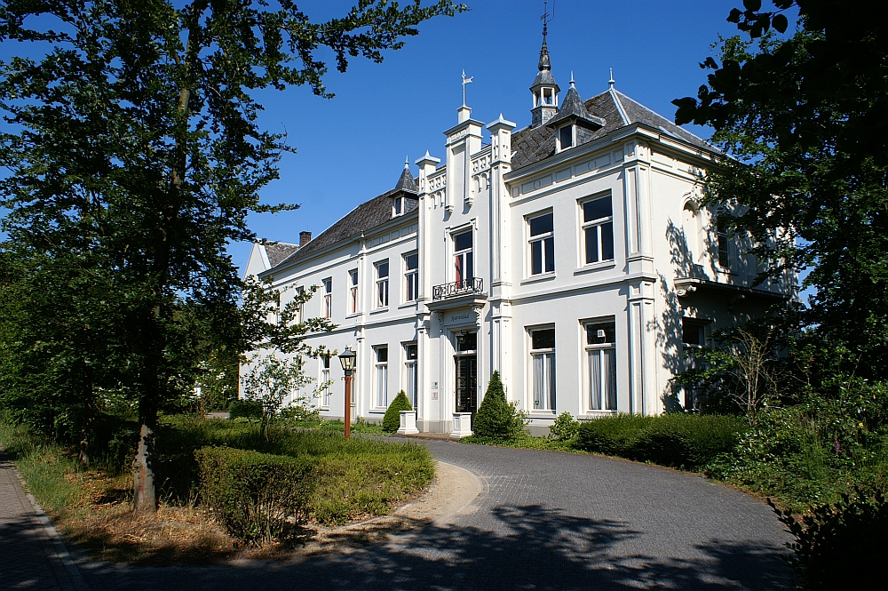 Huis Sparrendaal te Vught.